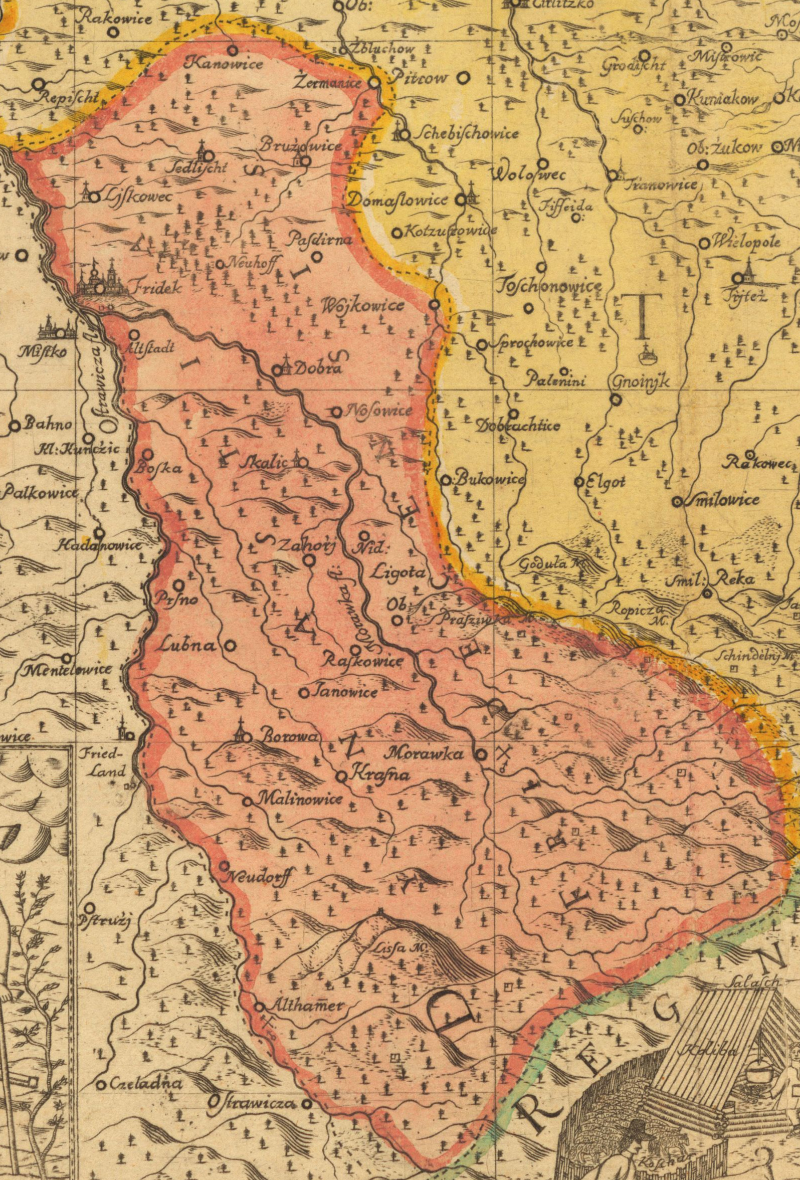 Mapa Księstwa Cieszyńskiego Jonasa Nigrinusa z 1724 - wycięte frydeckie państwo stanowe